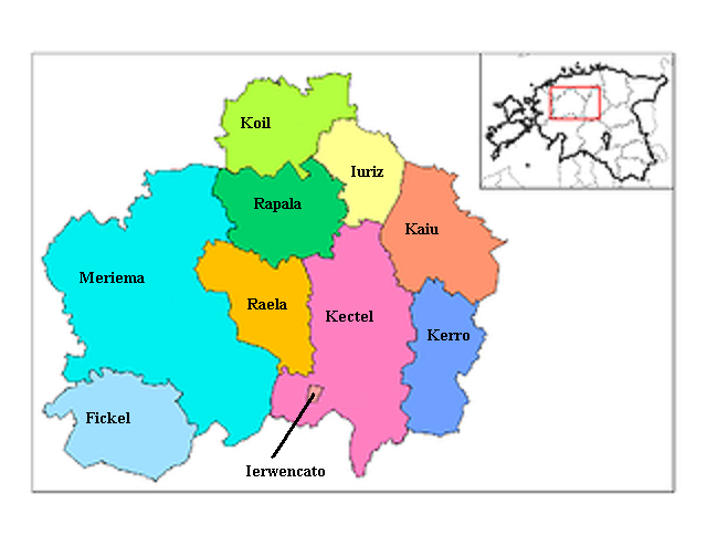 Rapalae municipia Latine